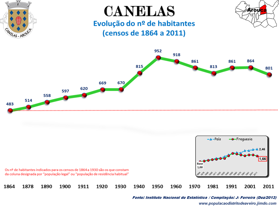 Evolução da População 1864 / 2011